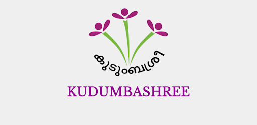 Kudumbashree official logo